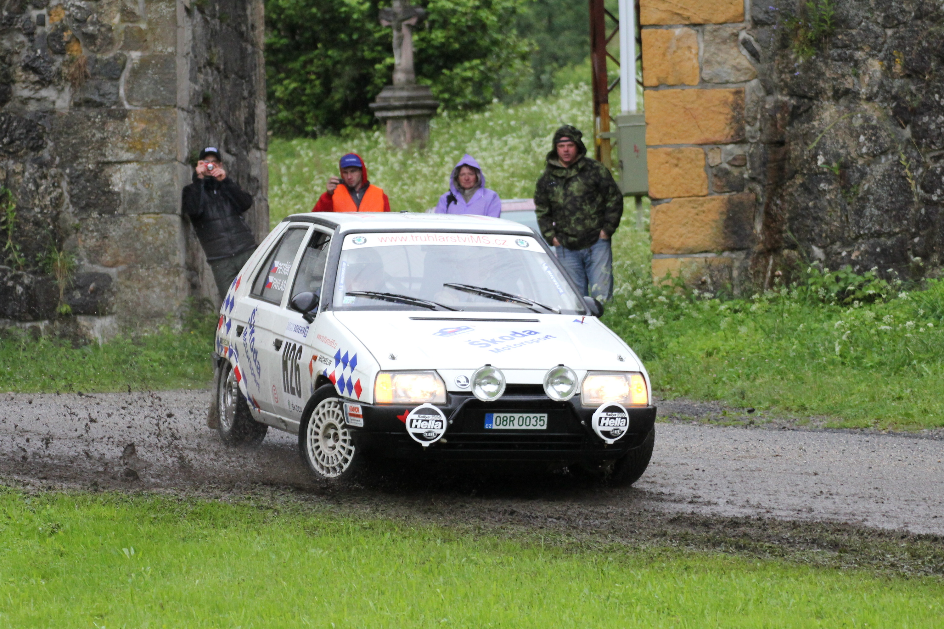 Rally Bohemia 2011 HS - Škoda Favorit